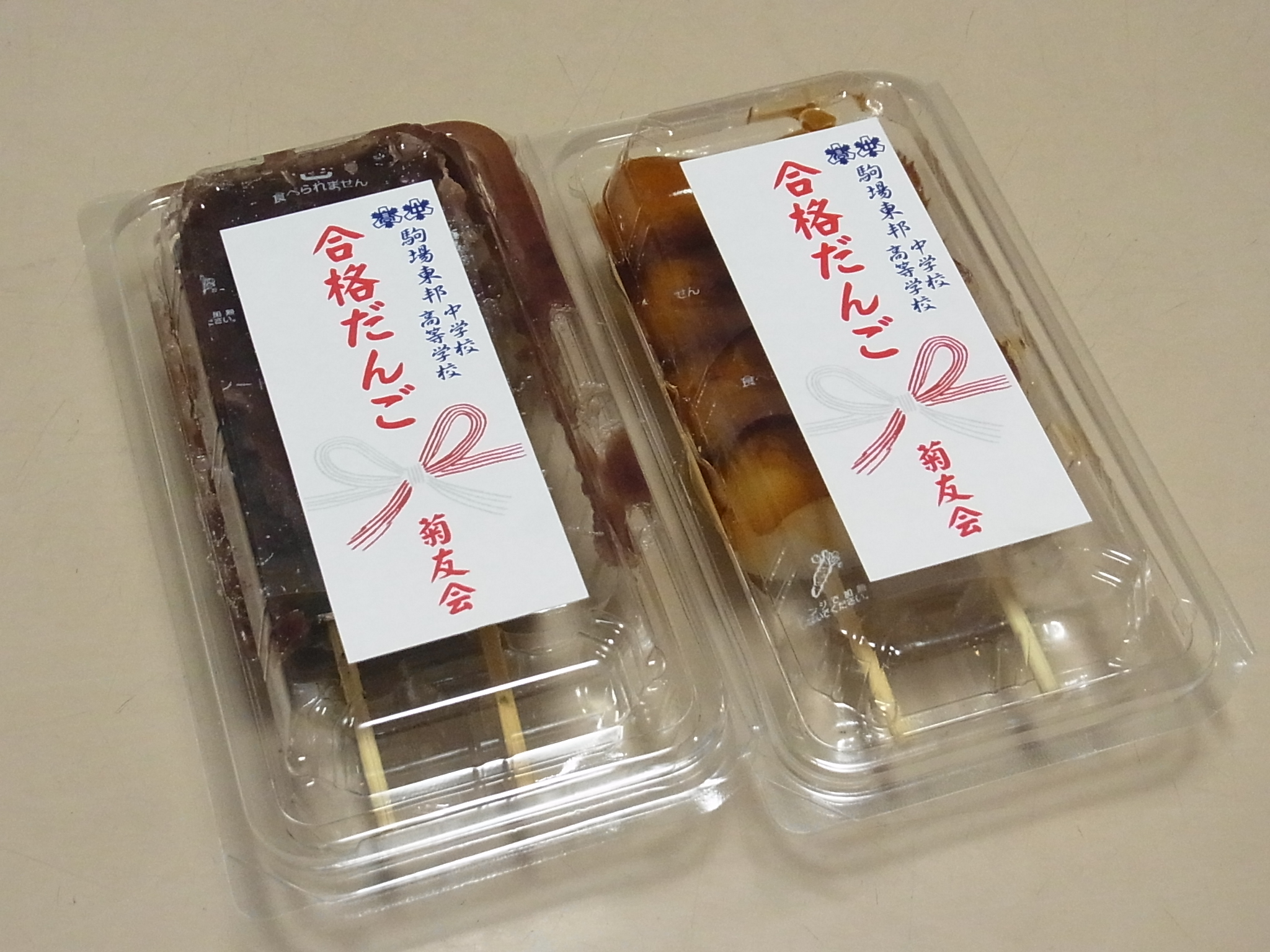 駒場東邦中学校・高等学校